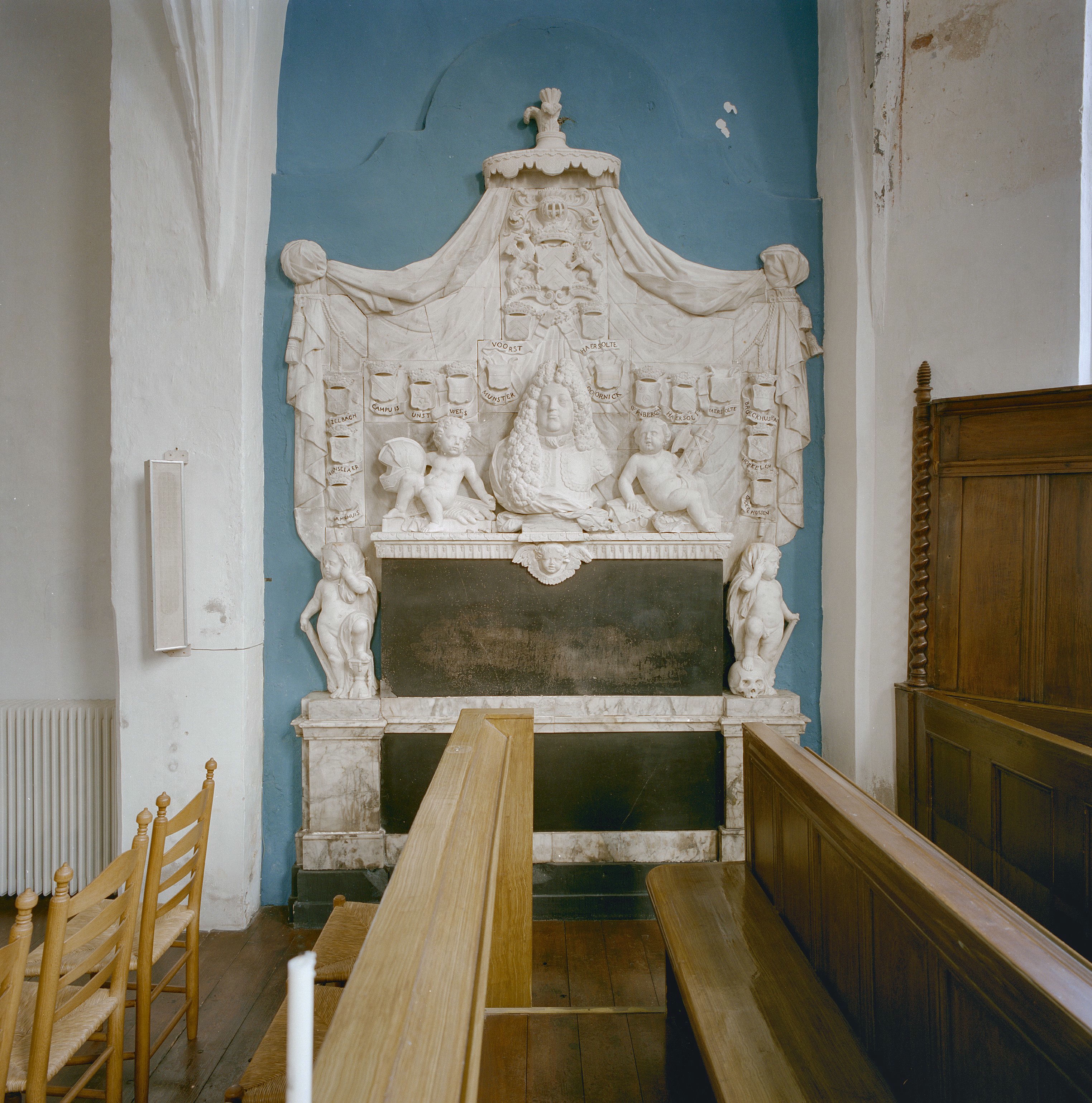 Nederlands Hervormde Kerk: INTERIEUR, KOOR NOORDZIJDE, GRAFMONUMENT